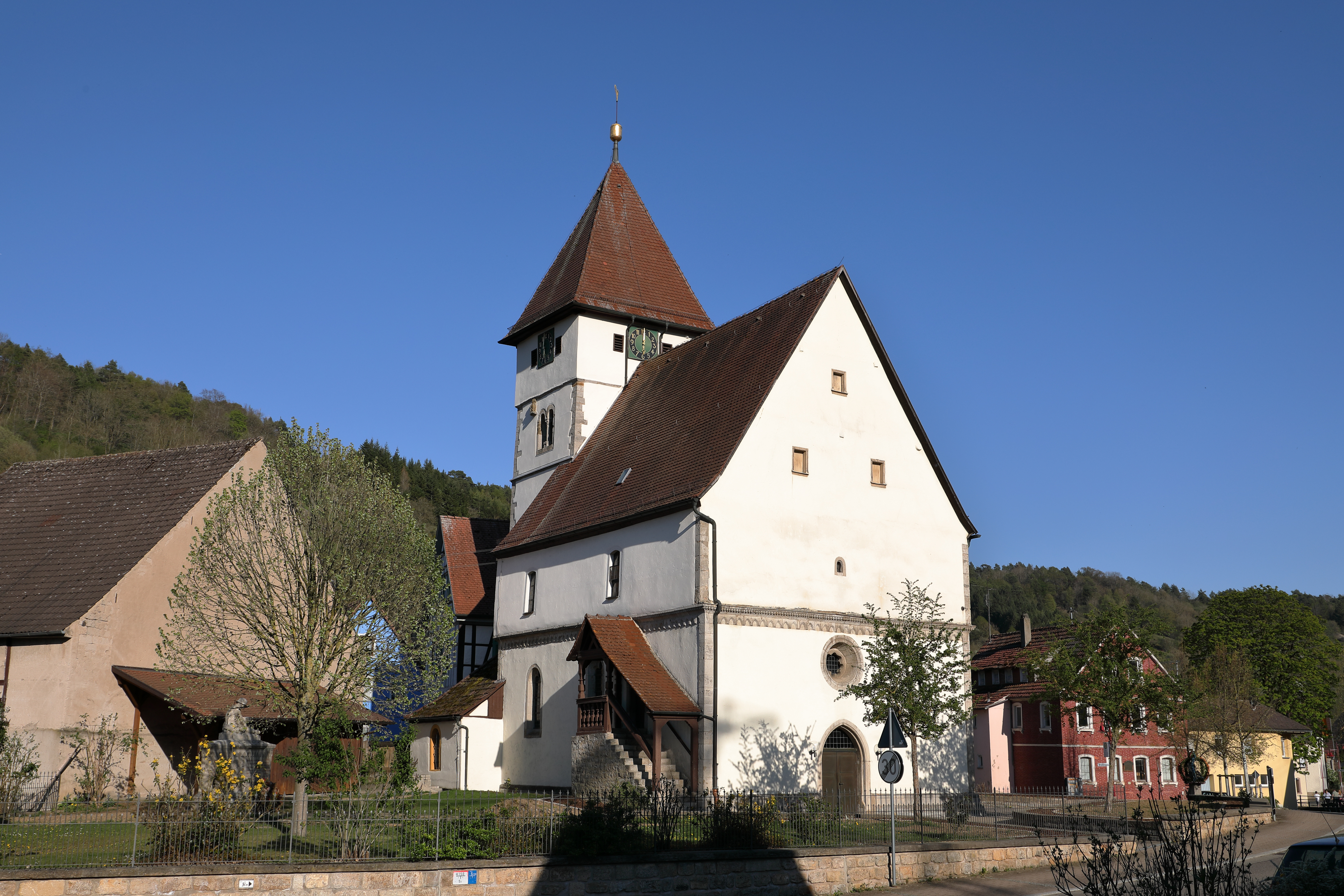 Die denkmalgeschützte Evangelische Pfarrkirche im Creglinger Ortsteil Münster.